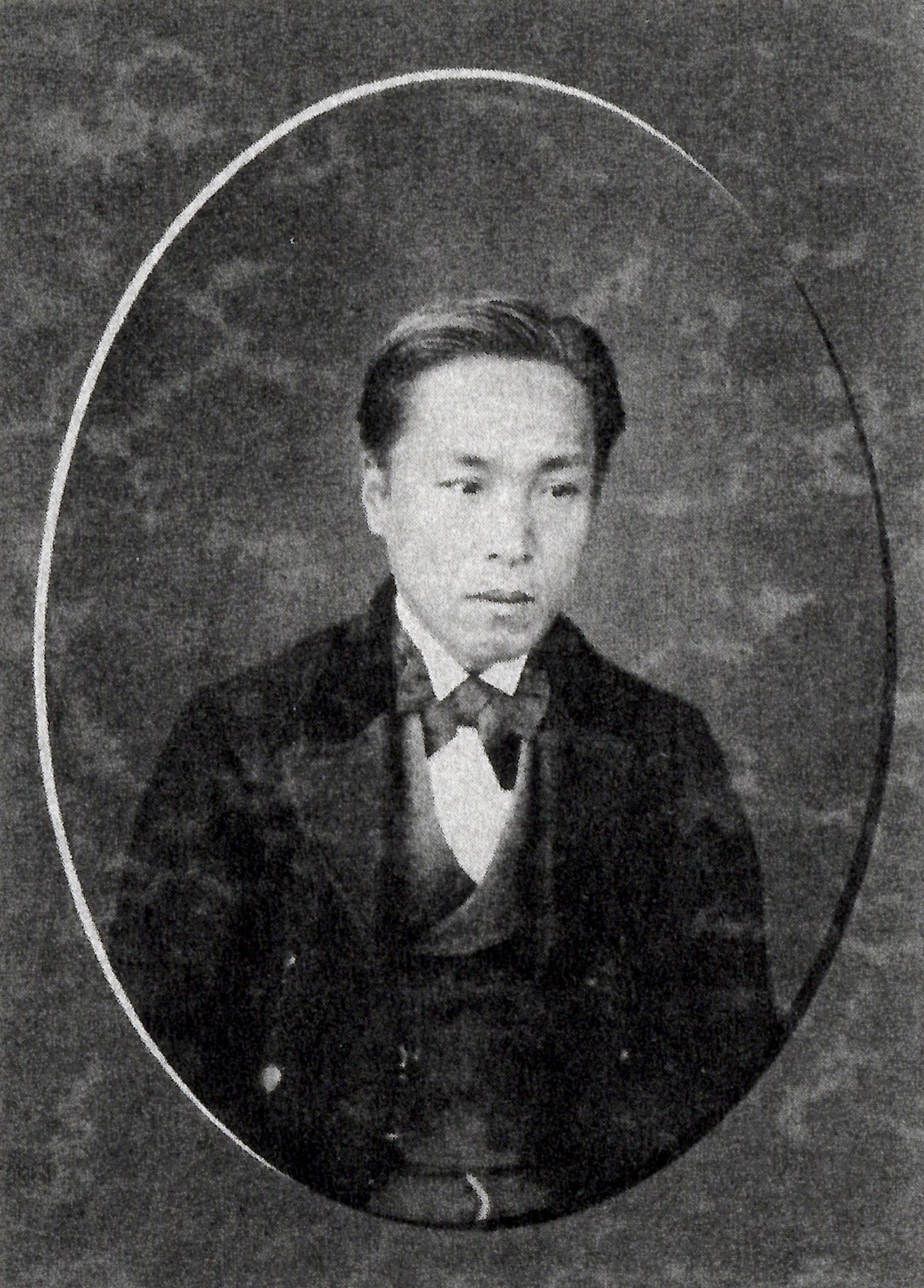 三室戸和光の肖像写真。